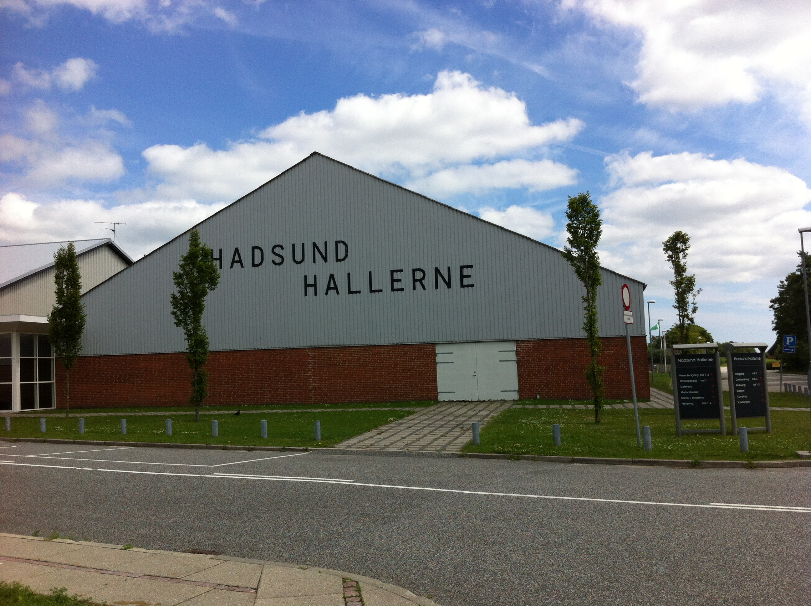 9560 Hadsund på Stadionvej